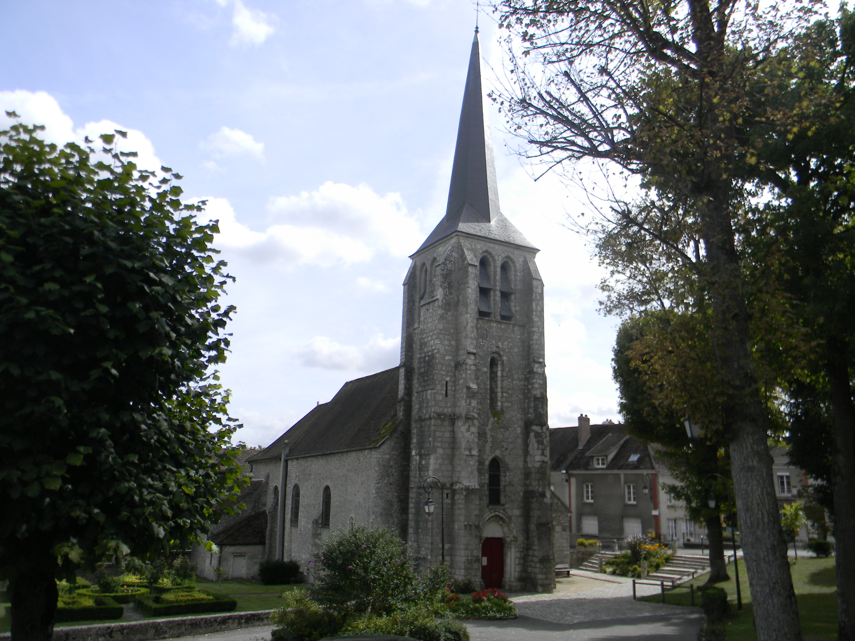 Eglise Saint-Pierre-Saint-Paul de Saint-Pierre-lès-Nemours (XIIe siècle).